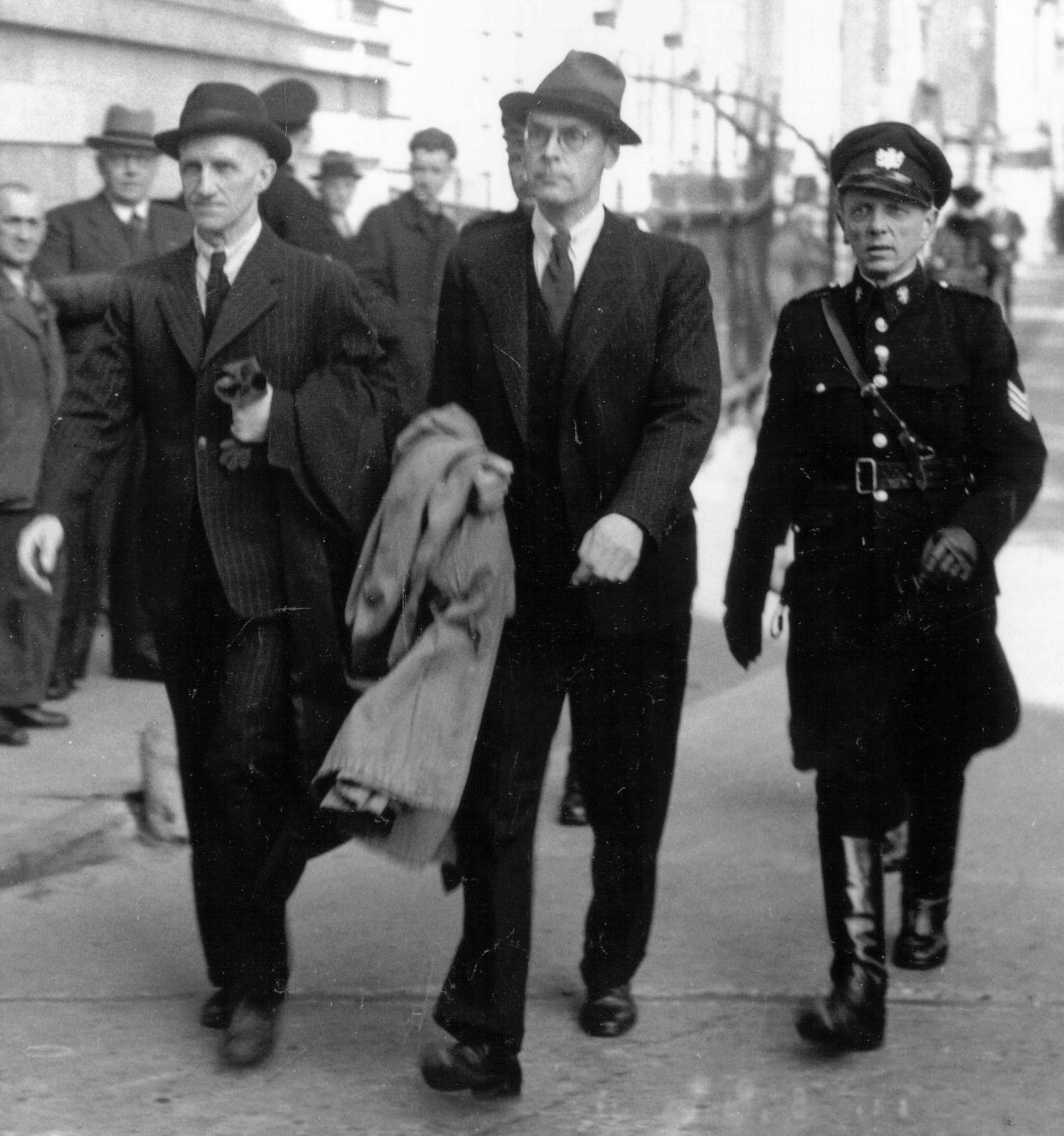 Otto Bene, Duits gezant, en Tobie Goedewaagen, voormalig secretaris-generaal op het Departement van Volksvoorlichting en Kunsten, op weg naar het Bijzonder Gerechtshof om te getuigen in de zaak De Geer, Herengracht op de hoek met de Nieuwe Spiegelstraat, Amsterdam, 9 mei 1947 Foto Ben van Meerendonk / AHF, collectie IISG, Amstrdam Foto gepubliceerd in De Waarheid, 9 mei 1947, voorpagina